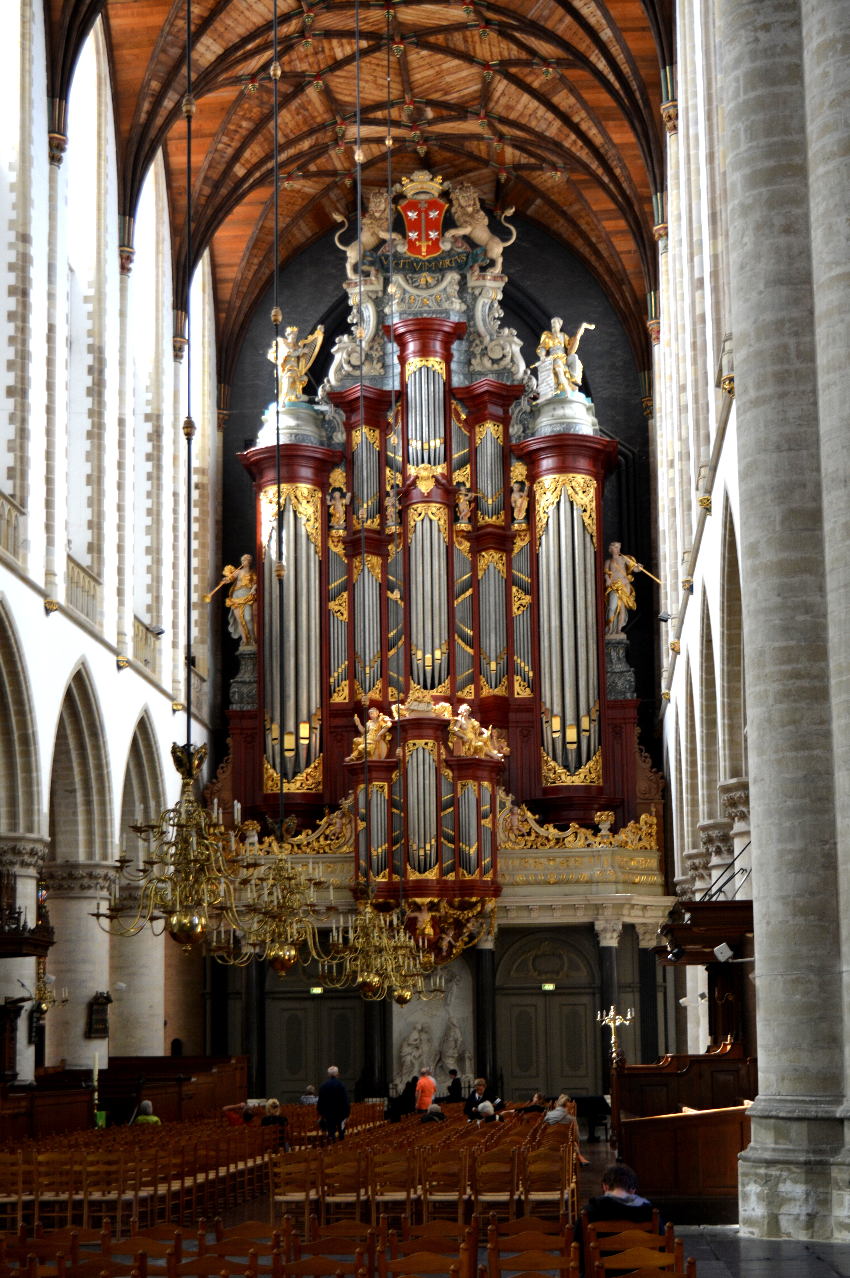 Haarlem, Grote- of Bavokerk, Müller-orgel